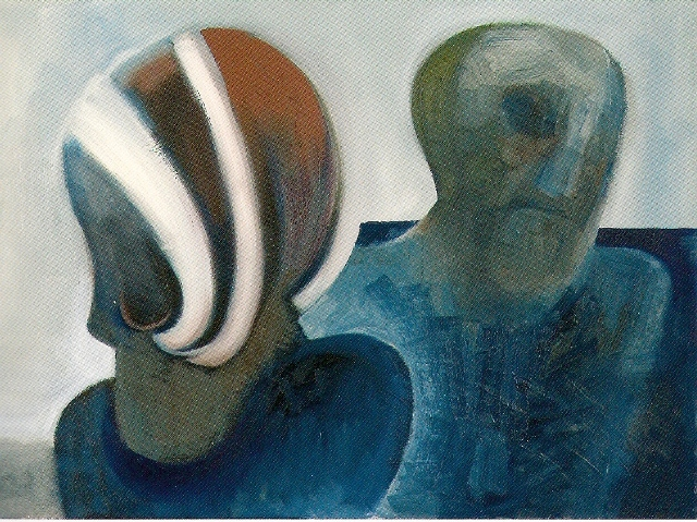 Insel, 2006. Öl, 80x120 cm